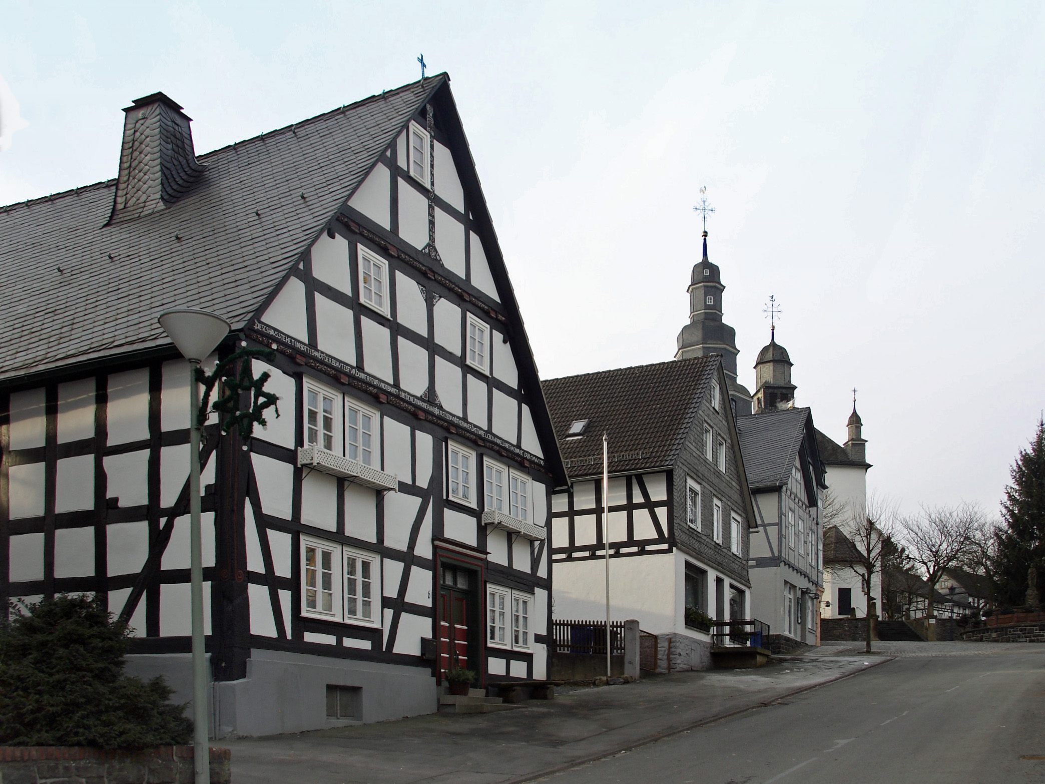 Gebäude der Petrusstraße 2 bis 6 in Hallenberg